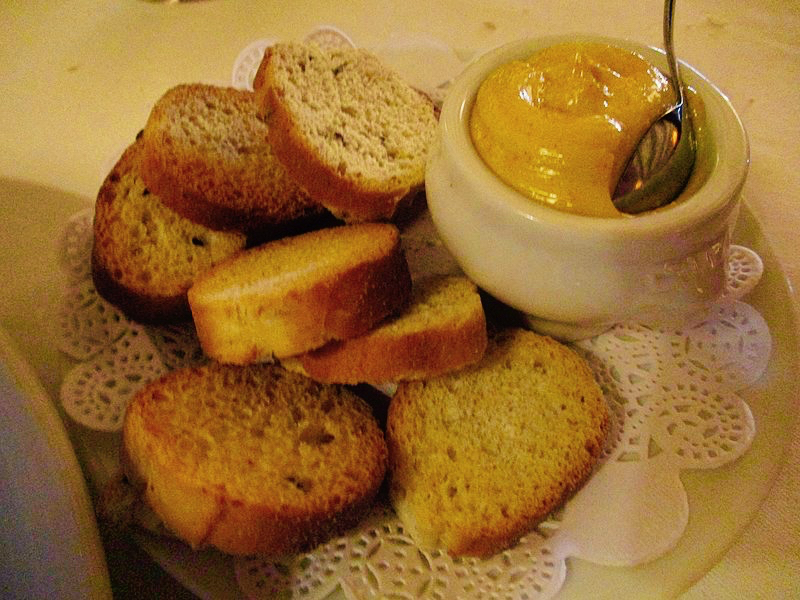 Croûtons et rouille de bouillabaisse du vieux port de Marseille